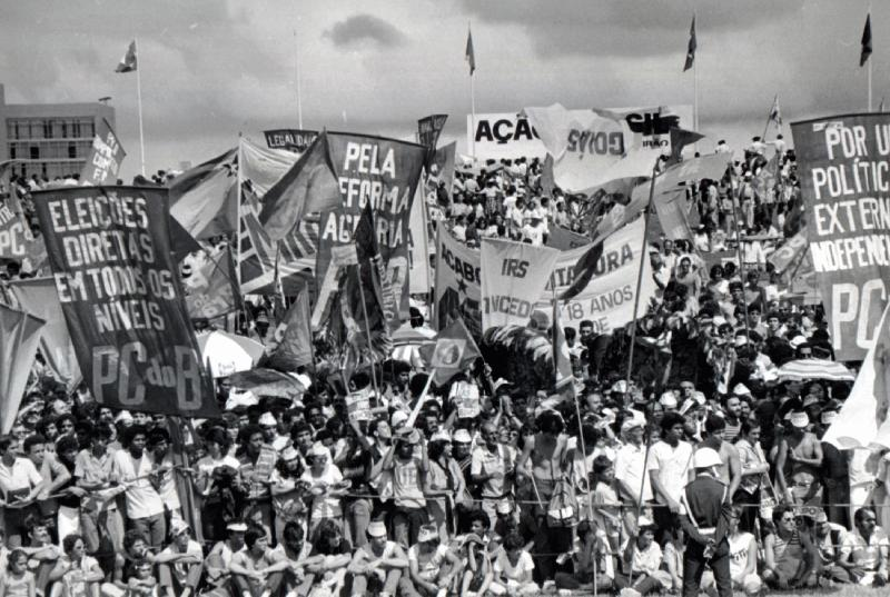 Brasília - Nas ruas de Brasília, diante do Congresso Nacional, o povo se manifesta e exige o restabelecimento das eleições diretas para presidente da República.